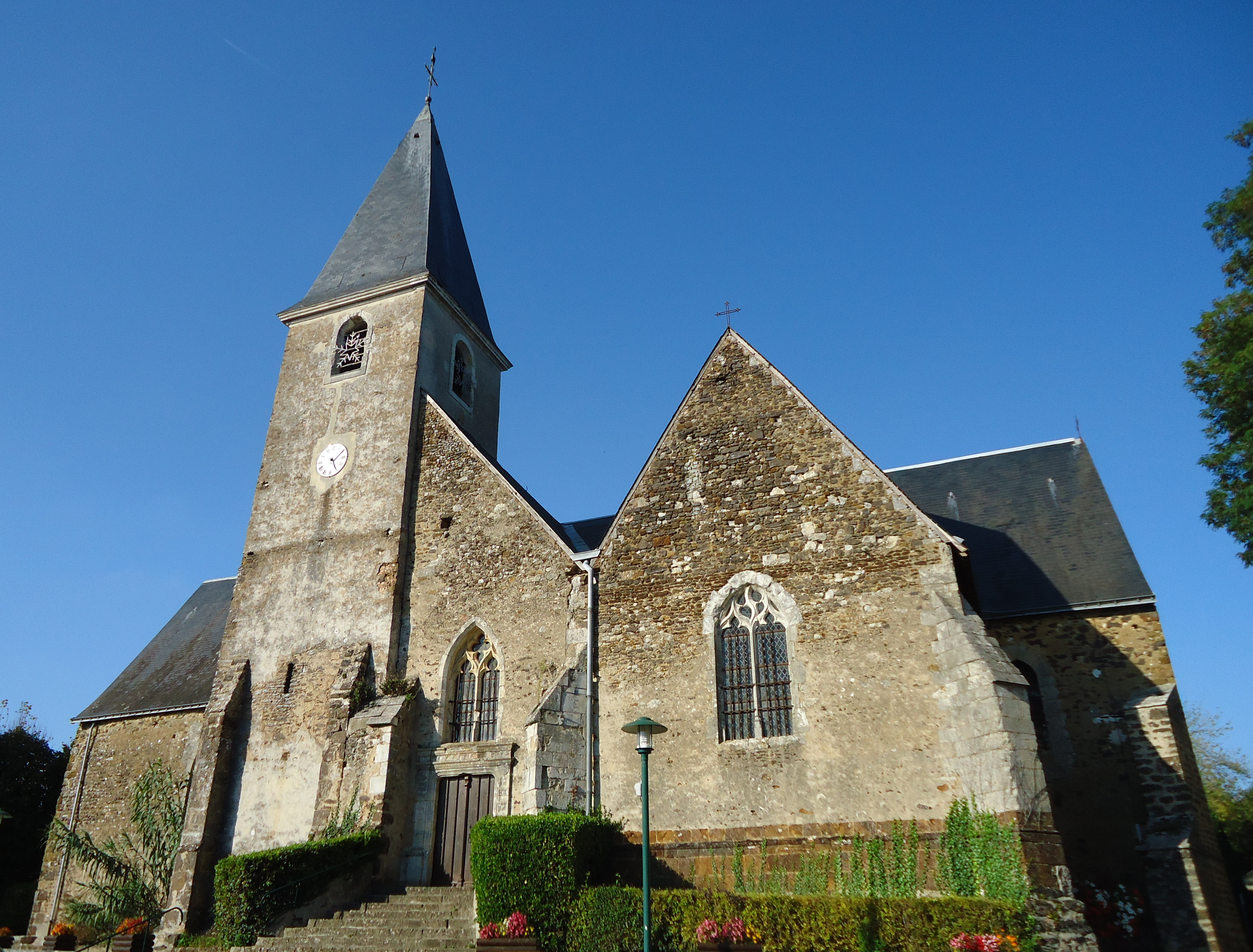 Vue sud - Eglise Saint-Médard - Saint-mars-d'Outillé - Sarthe (72)